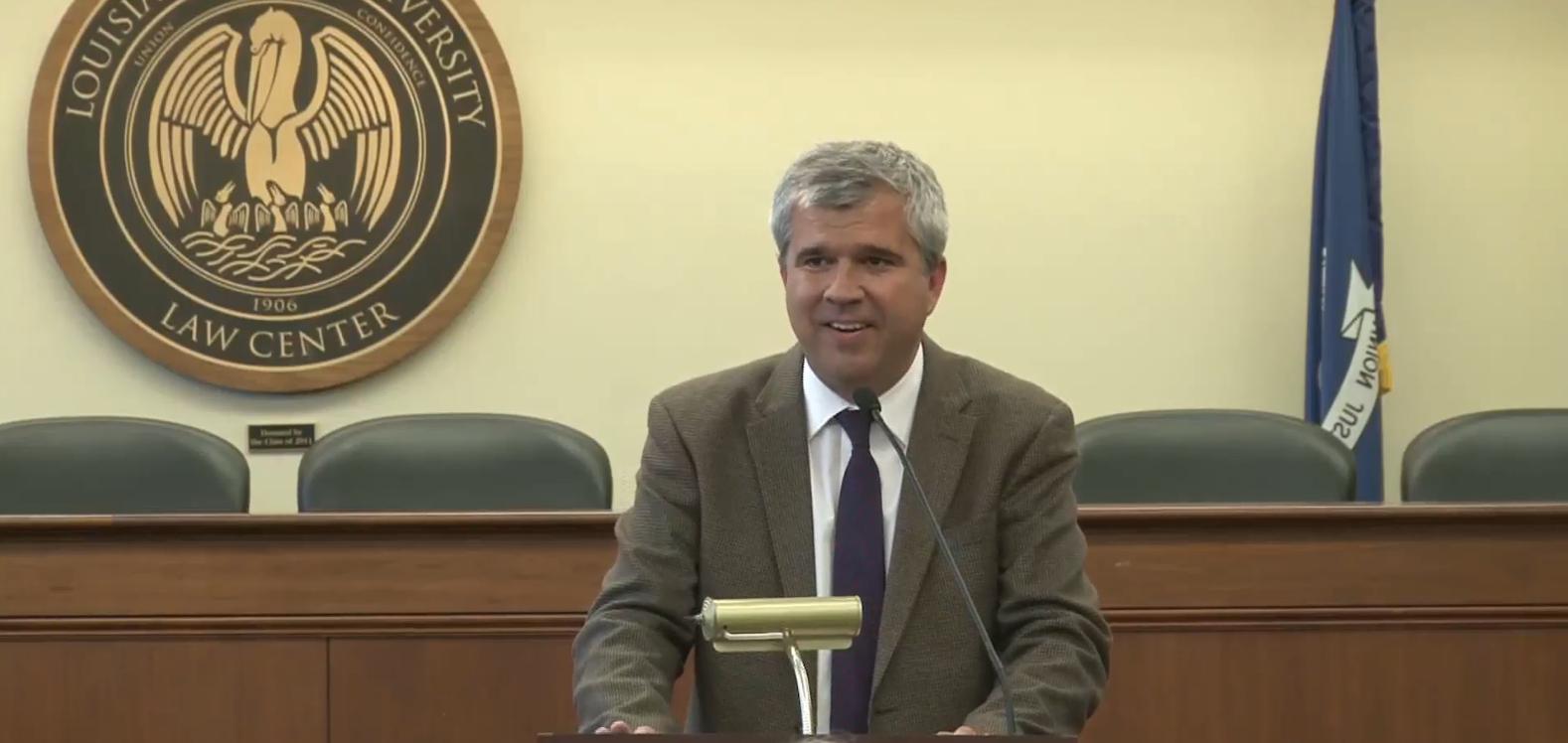 Santiago Legarre en LSU